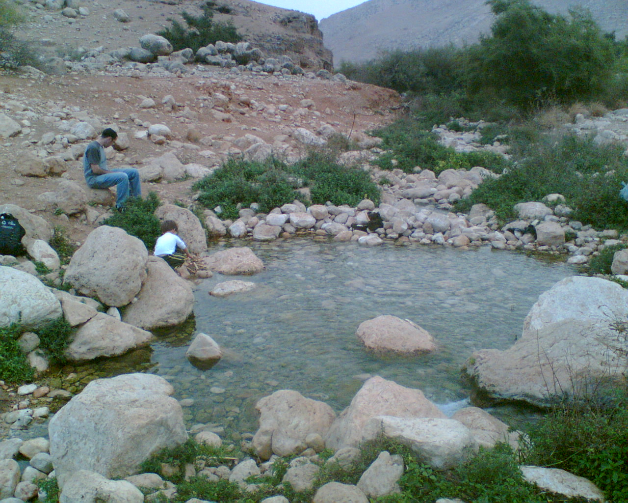 אחד מעינות פצאל שבנחל פצאל בבקעת הירדן